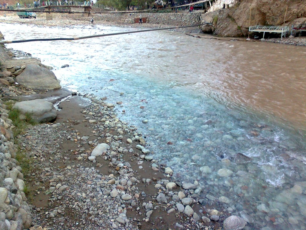 Хужайпок Маскани - это достопримечательность Южной части Узбекистана (Сурхандарьинская область) у подножьях гор и целебным источником. Две разных ручьей вливаются в едино (синий цветом целебный источник и само речка)